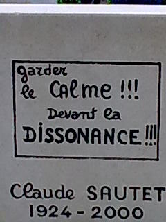 Pierre tombale de Claude Sautet au cimetière du Montparnasse, épigramme : "Garder le calme !!! devant la dissonance !!!"